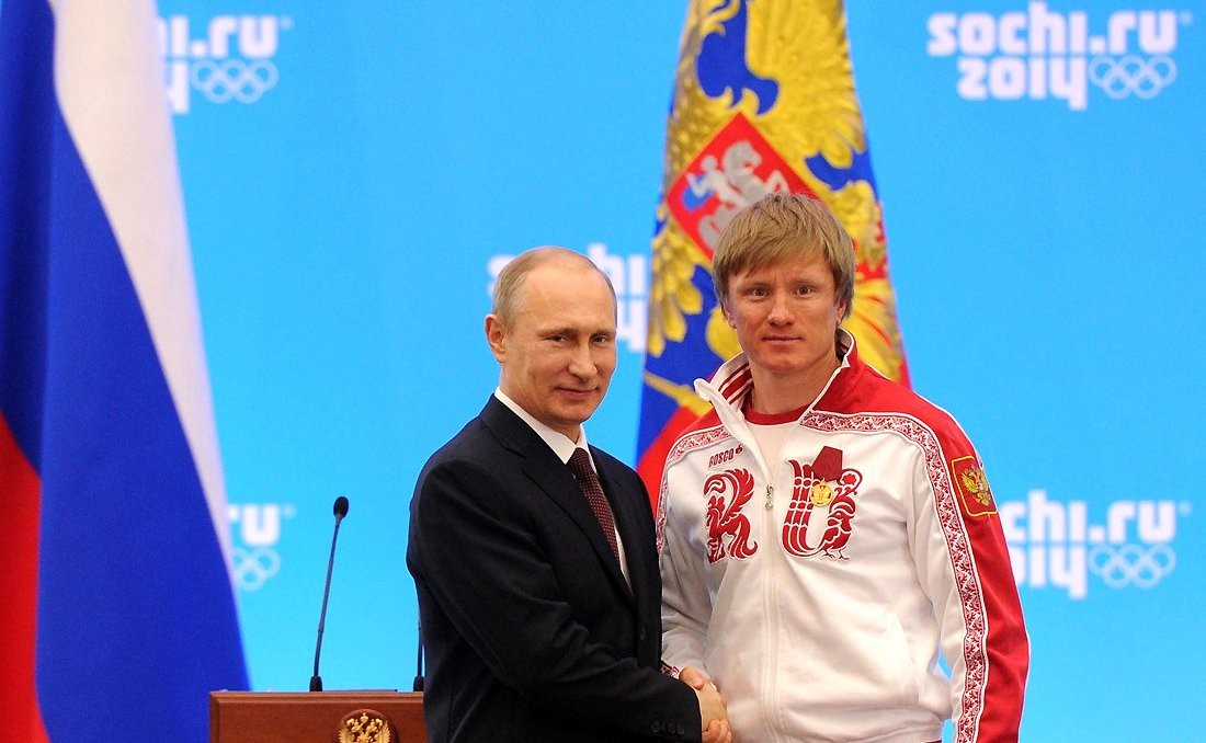 Медалью ордена «За заслуги перед Отечеством» первой степени награждён серебряный призёр Олимпийских игр в лыжных гонках Дмитрий Япаров.